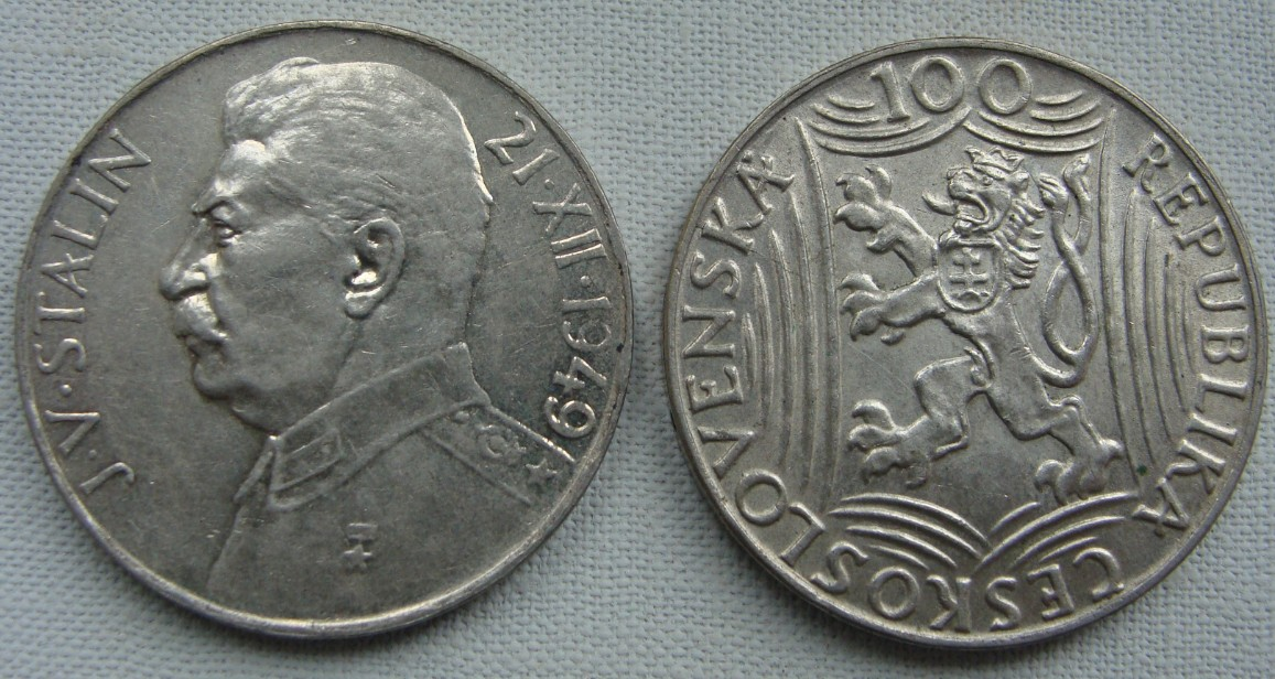 CZECHOSŁOWACJA 100 KORON 1949 JÓZEF STALIN